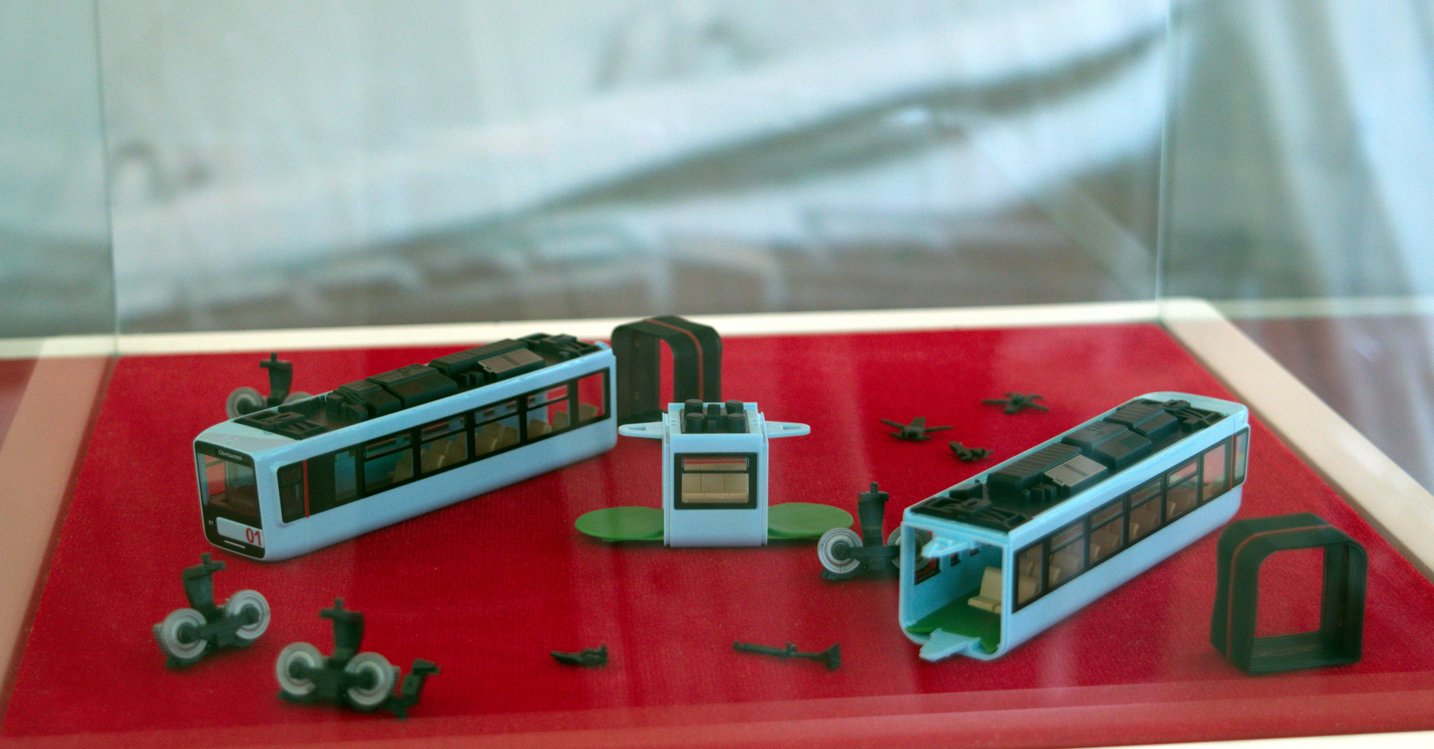 Anlieferung des erstenn GTW 2014 am 14. November 2015 in Wuppertal. Mit einem kleinen Volksfest zu Begrüßung und Einweihung des Schwebebahnparks im Stationsgarten Vohwinkel.